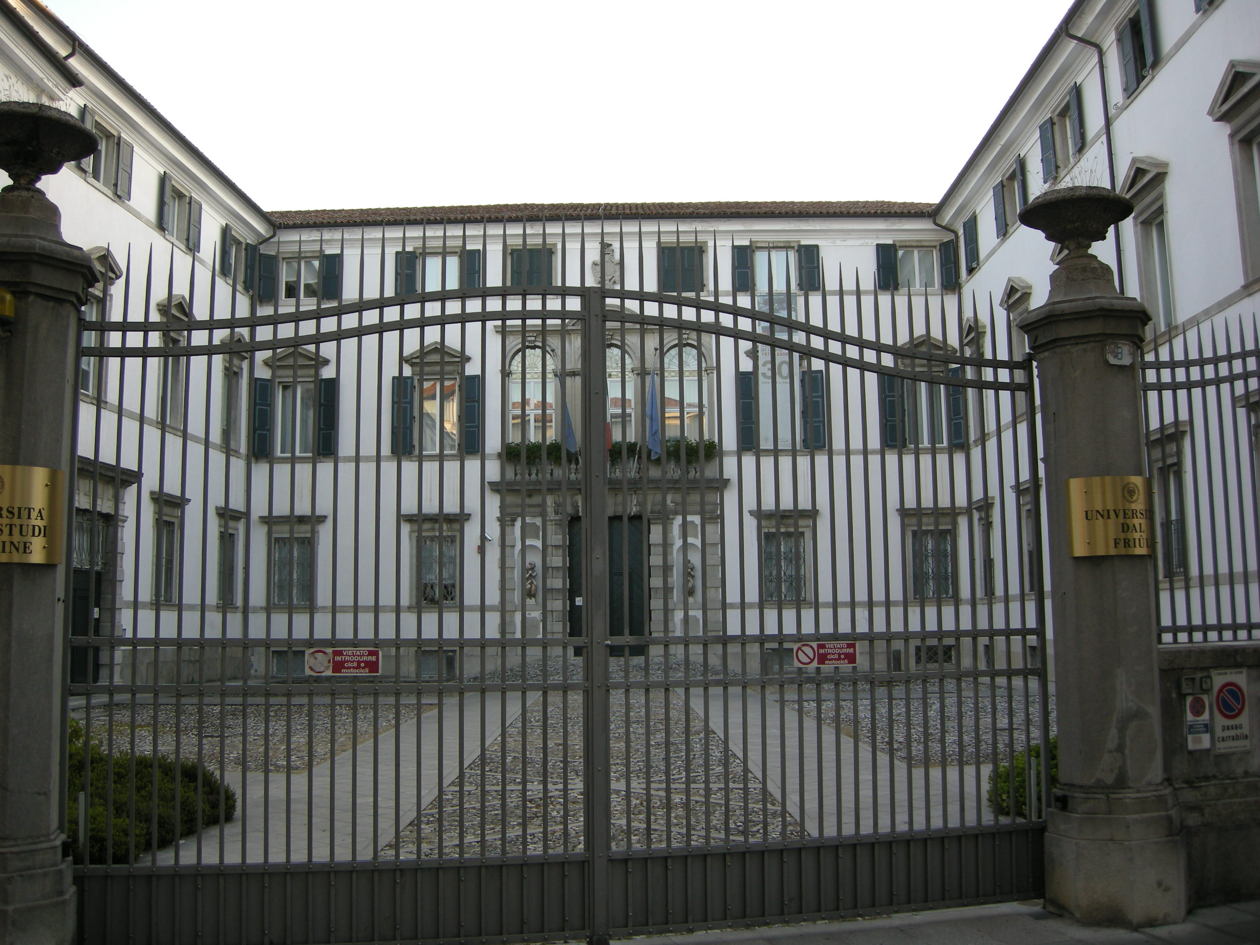 Udine, palazzo florio